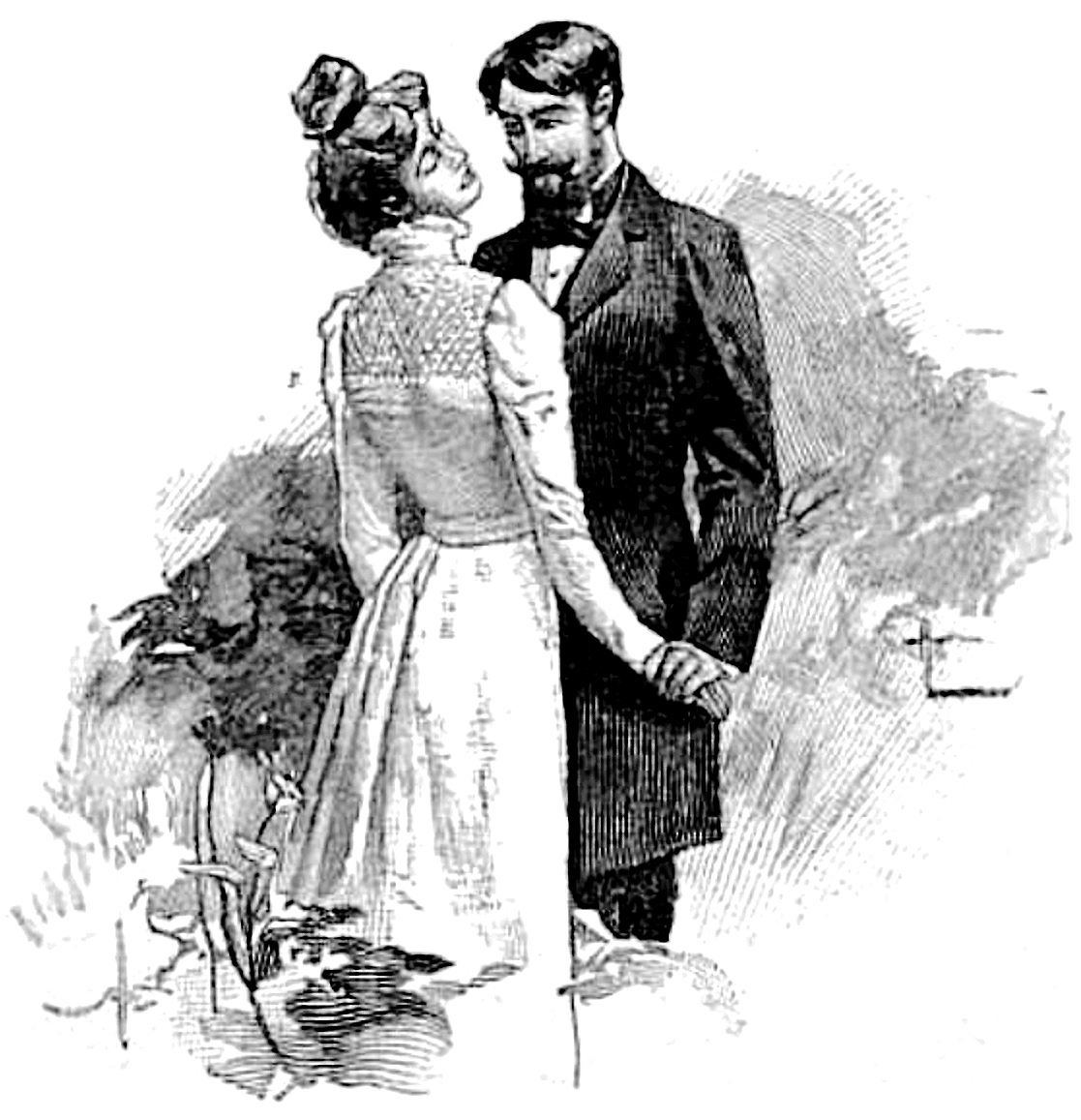 Guy de Maupassant's Une Vie